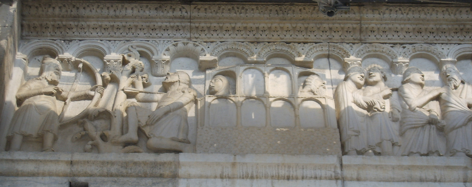 duomo di modena